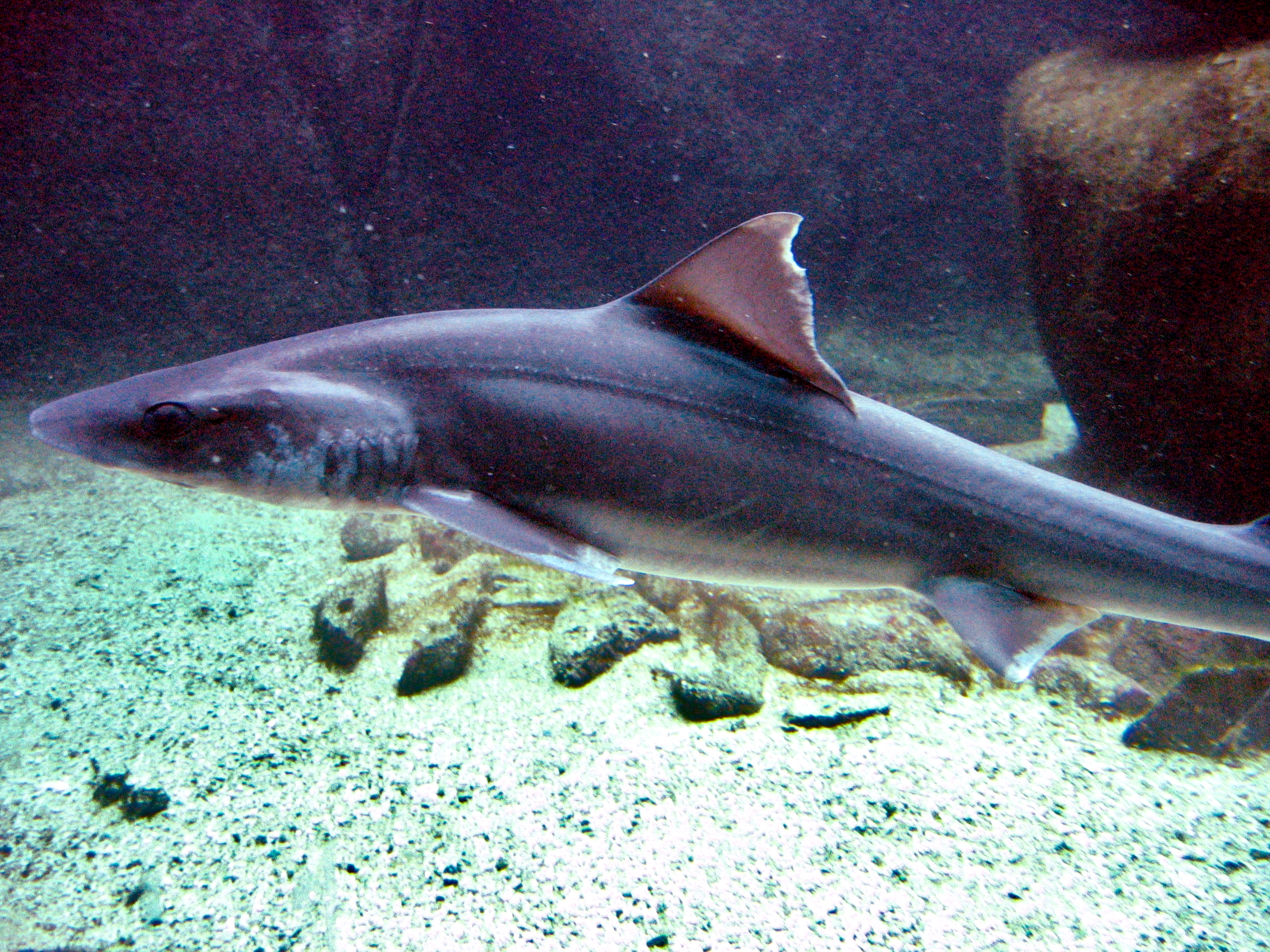 Mustelus asterias – Émissole tachetée, aquariums d'Océanopolis, Brest